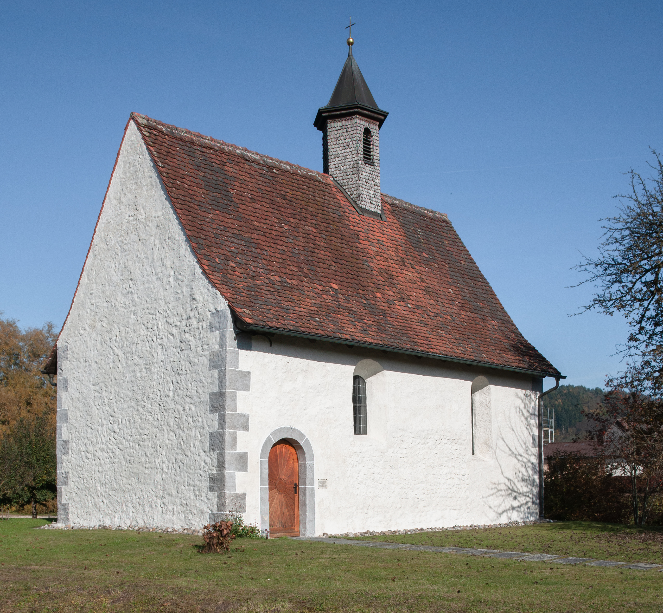 St. Gallus-Kapelle in Deggenhausertal-Wittenhofen, erwähnt 1275, renoviert 2007